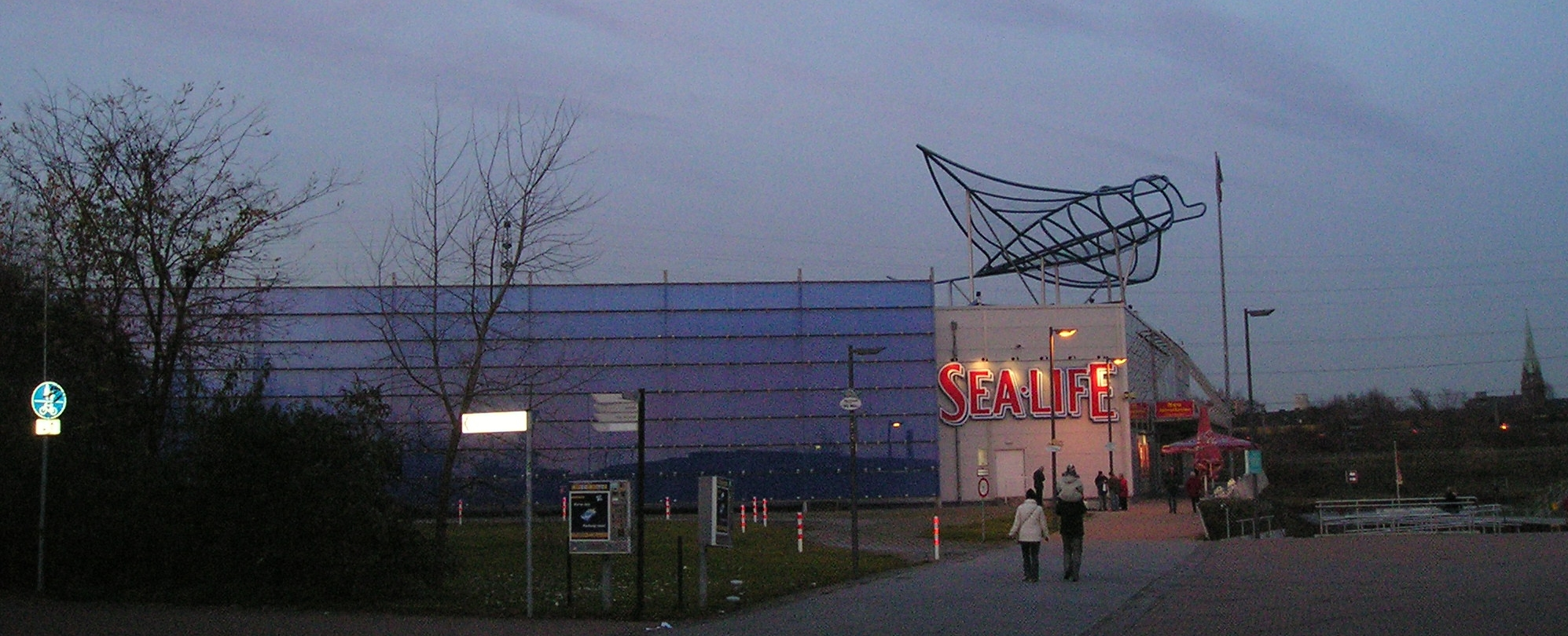 Sealife Oberhausen